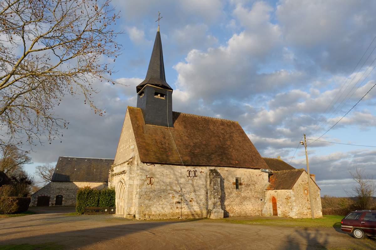 Église Notre-Dame de Tilly (France - Indre) .